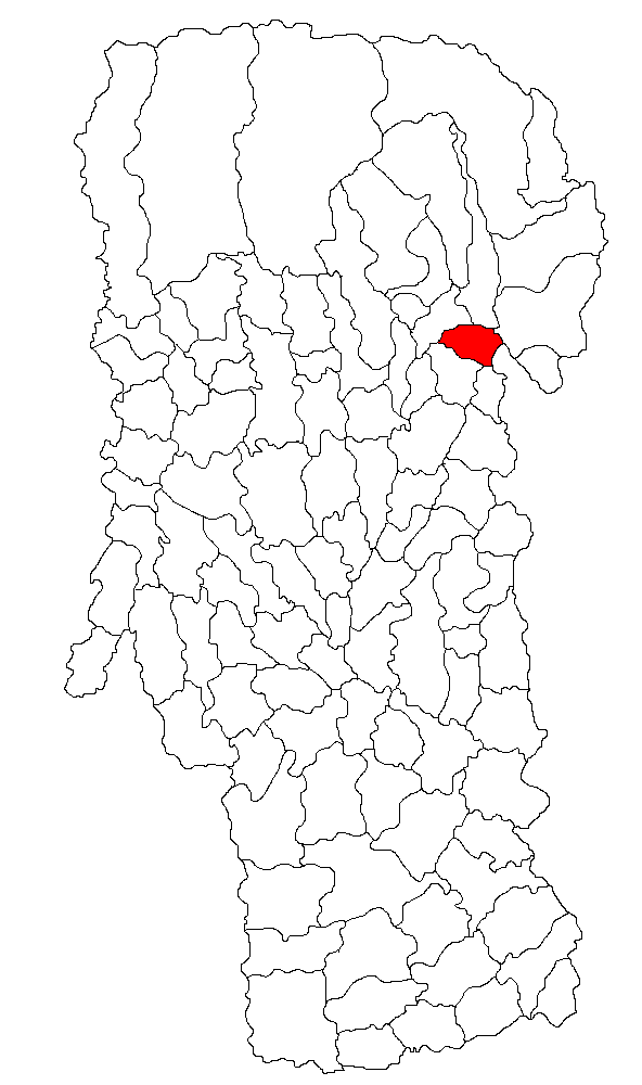 Categorie:Hărţi ale judeţului Argeş